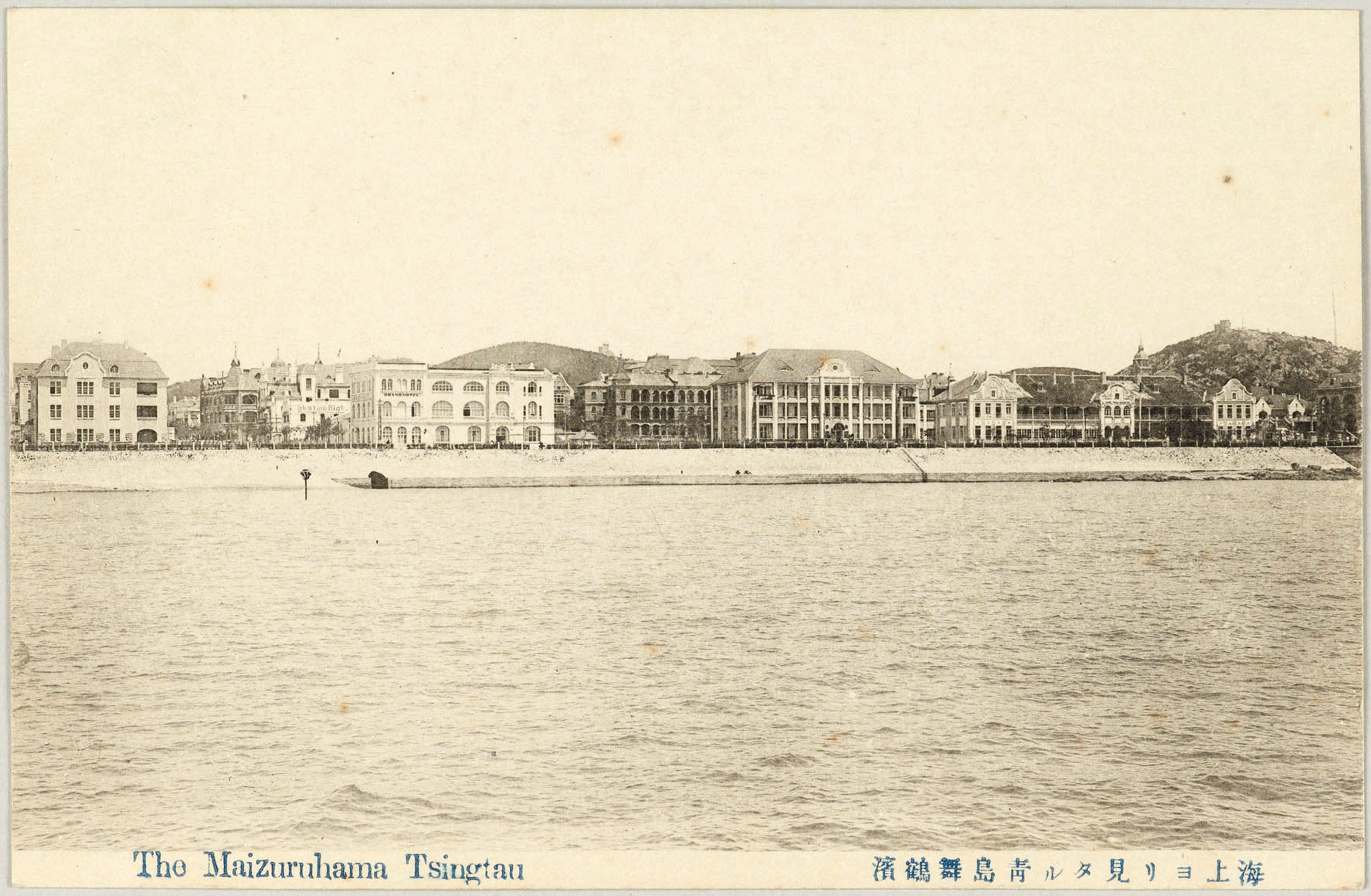 青岛太平路